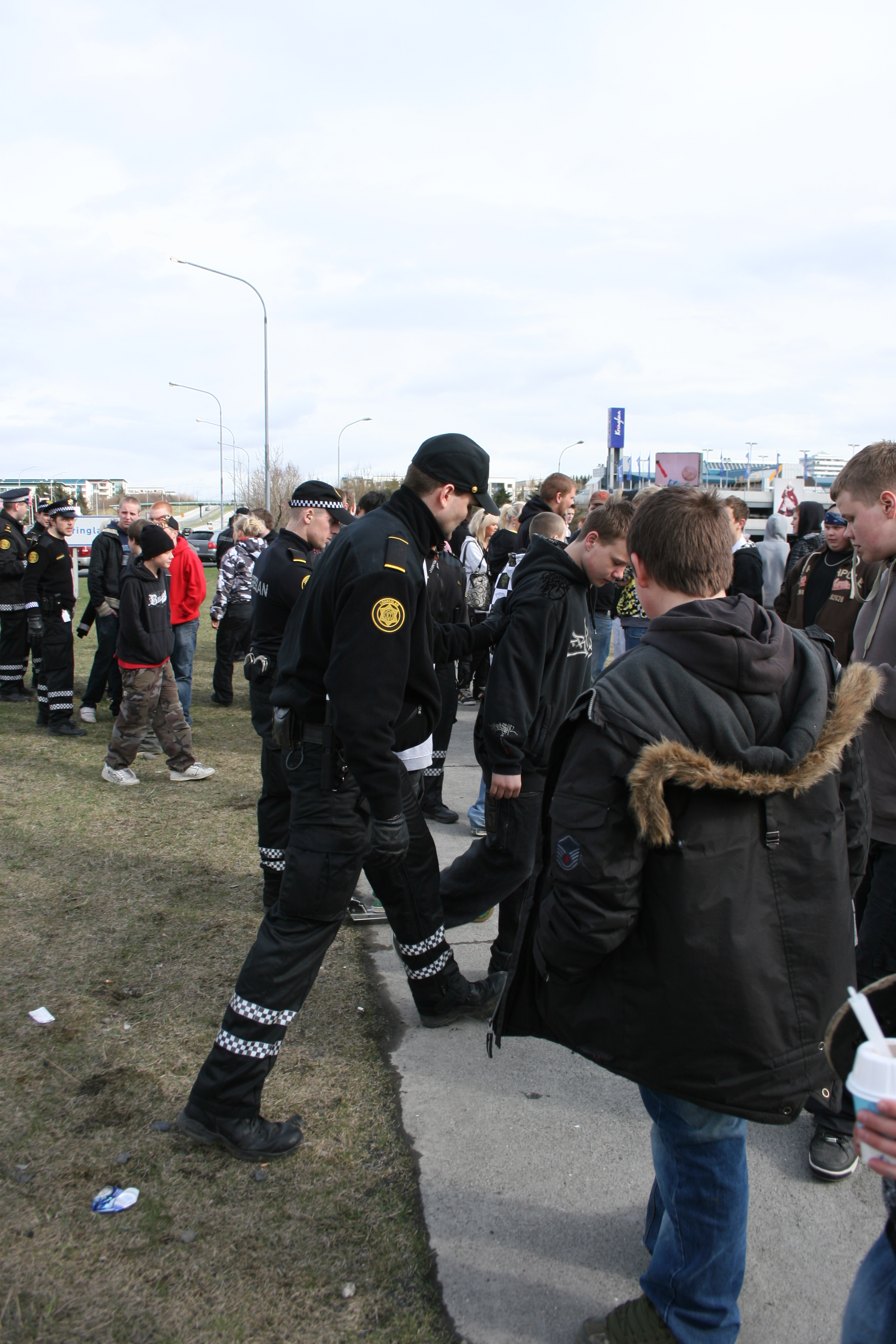 Mótmæli ungmenna 25. apríl 2008